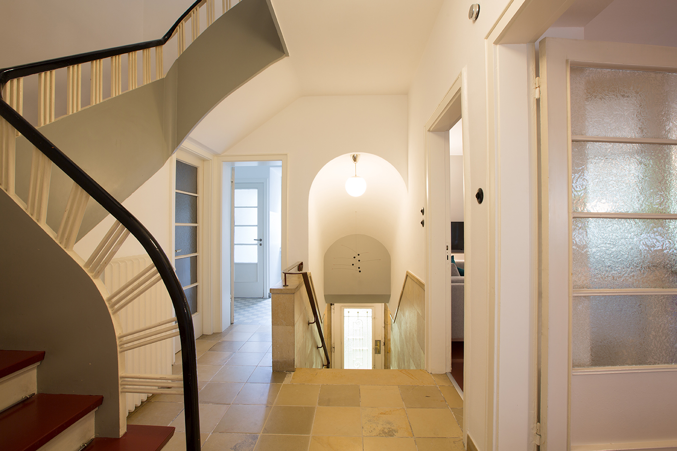 Eingangsbereich mit Solnhofer Plattenkalk, Balkelitschaltern und Zimmertüren mit Eisblumenglas.